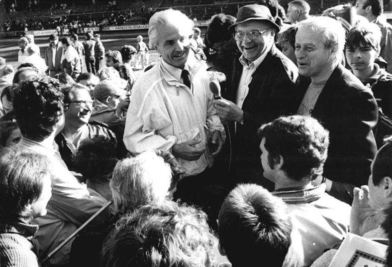 ADN-ZB-Kluge -7.10.87-kb- Bez. Leipzig: Finale der FDJ-Massenaktion "Alle reden vom Fußball - wir spielen"- Beim Fußballfest im Altenburger Lenin-Stadion stellten sich Prominente des DDR-Fußballs des zahlreichen Fragen des Publikums. V.r.: Wibbel Wirth, ehemaliger Nationalspieler, Rundfunkreporter Wolfgang Hempel, Georg Buschner, früherer Trainer der Nationalmannschaft."